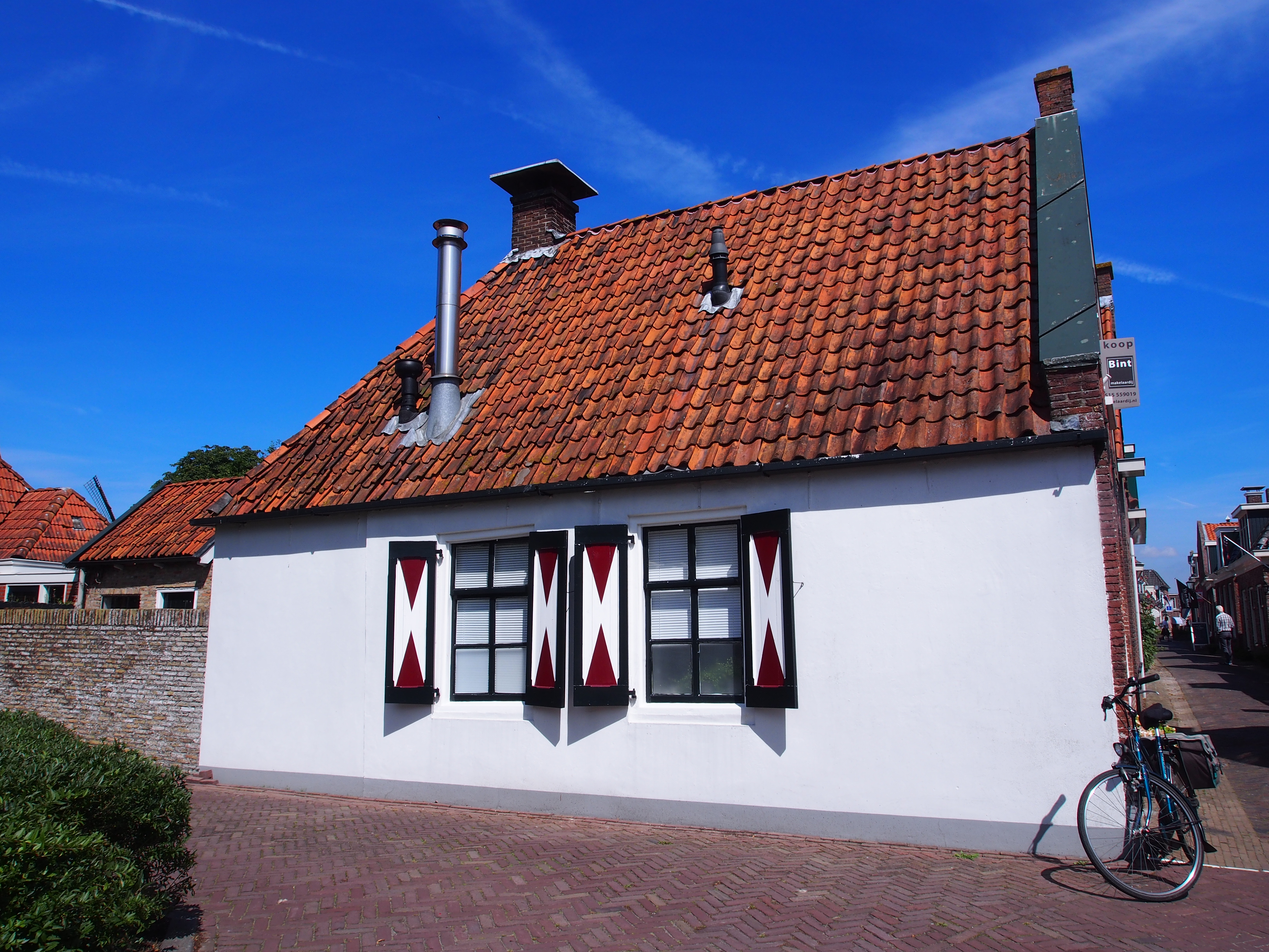 Midstrjitte 66, Woudsend